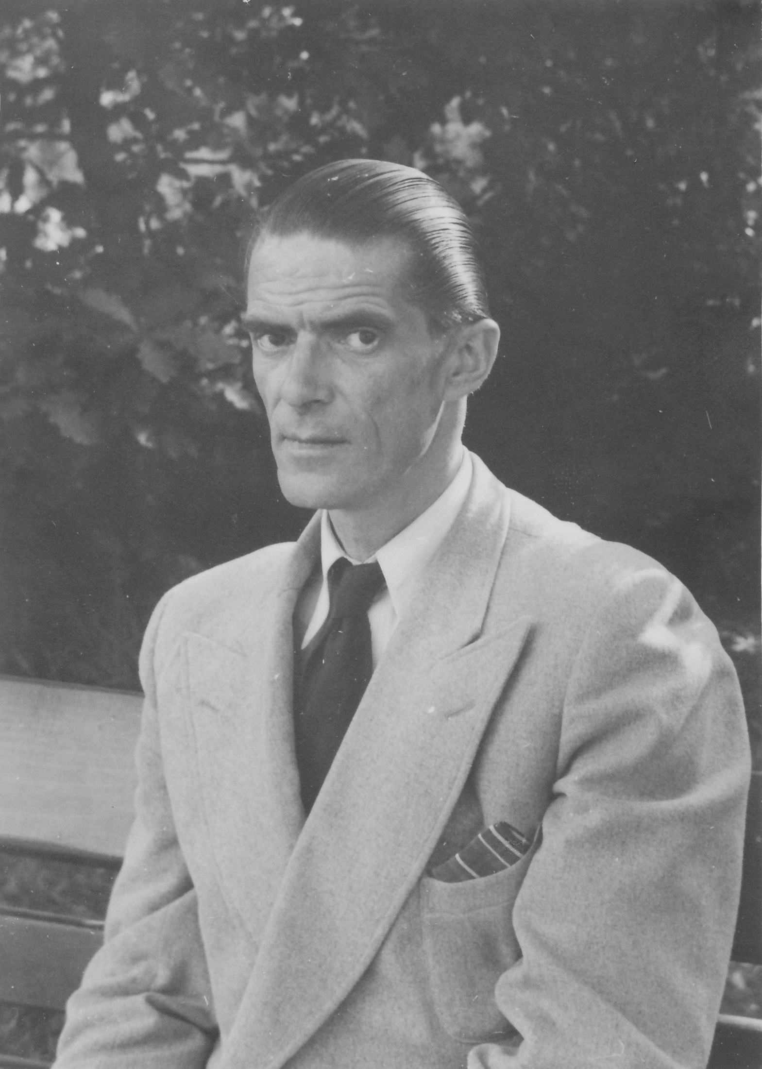 Fotografie von Traugott Fedtke (1909-1988)